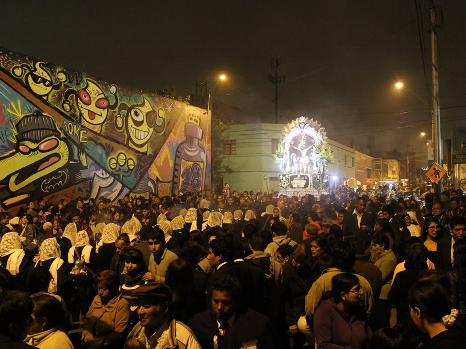 Barranco y el Señor de los Milagros